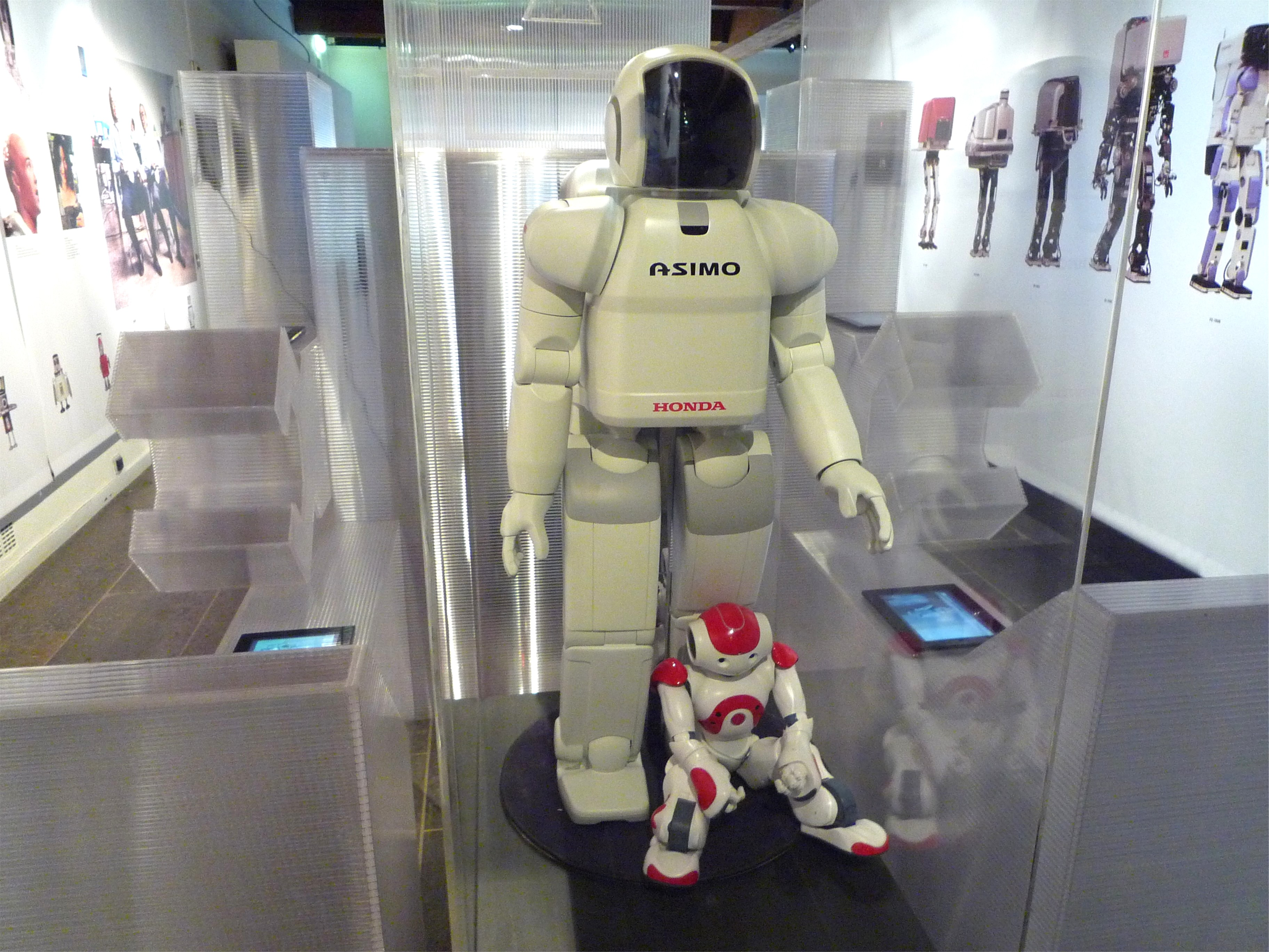 Robot Asimo en visite au musée dauphinois de Grenoble en 2011, exposition Vaucanson et l'homme artificiel.